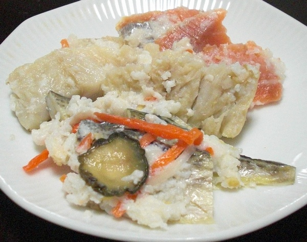 Izushi (飯寿司, kind of Sushi)